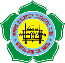 Logo Pondok Pesantren Raudhatul Ulum